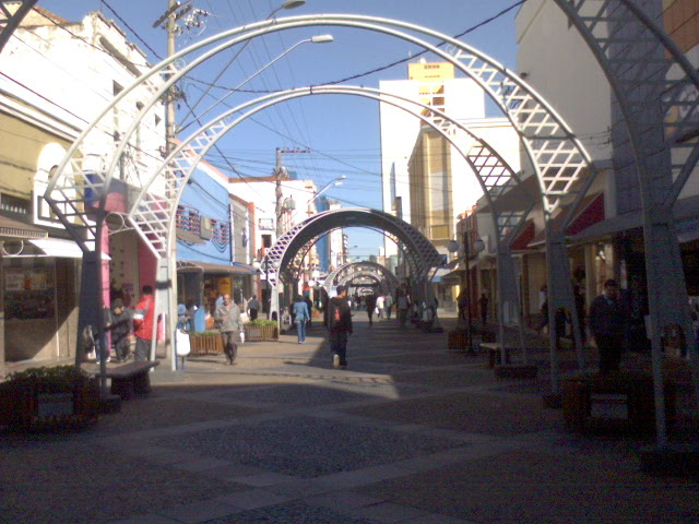 Calçadão de Bauru-SP, Brasil.